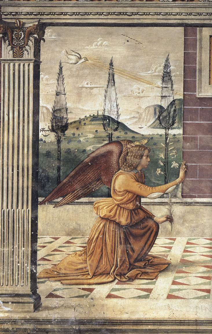 Sebastiano Mainardi: Annunziazone, Duomo, San Gimignano